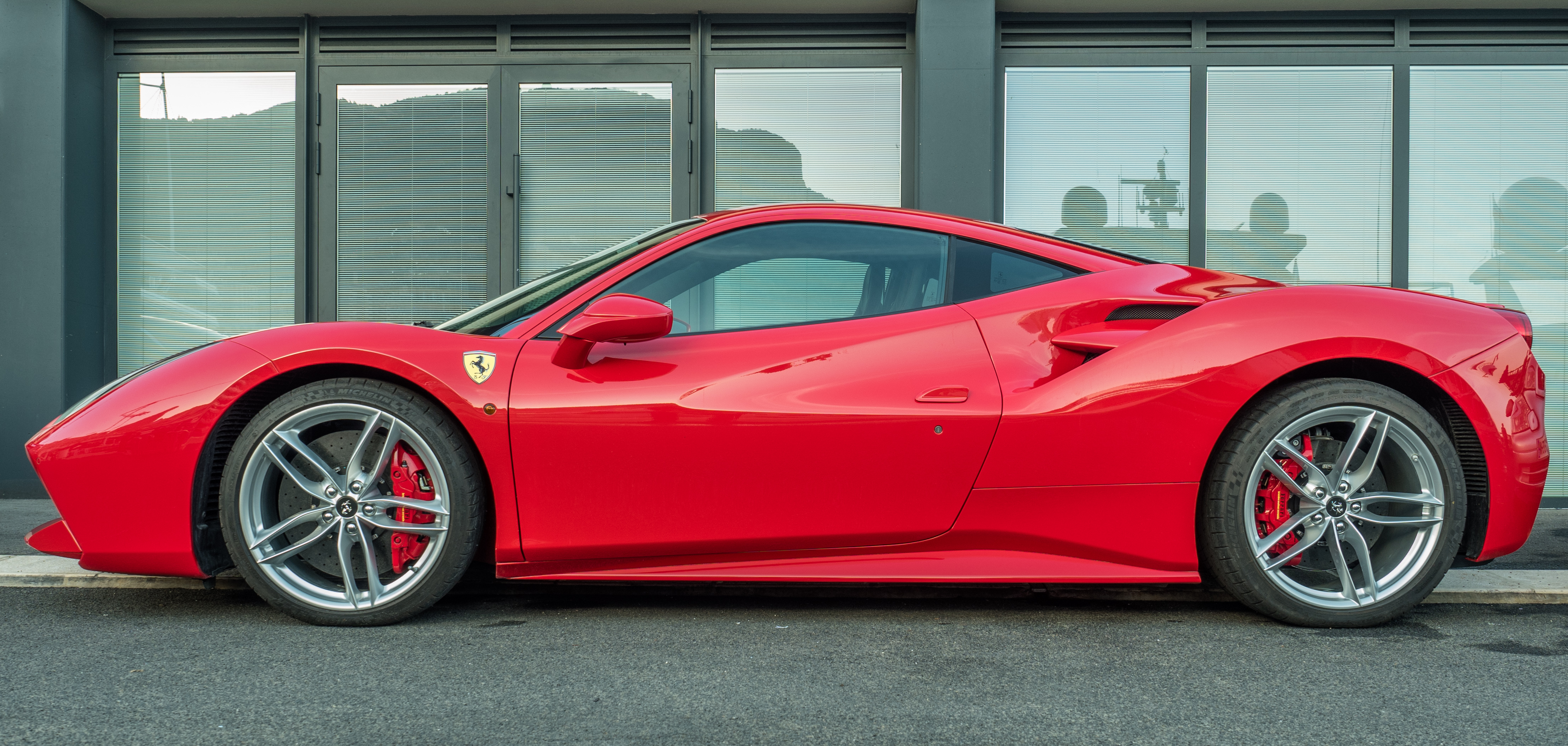 Ferrari 488 GTB